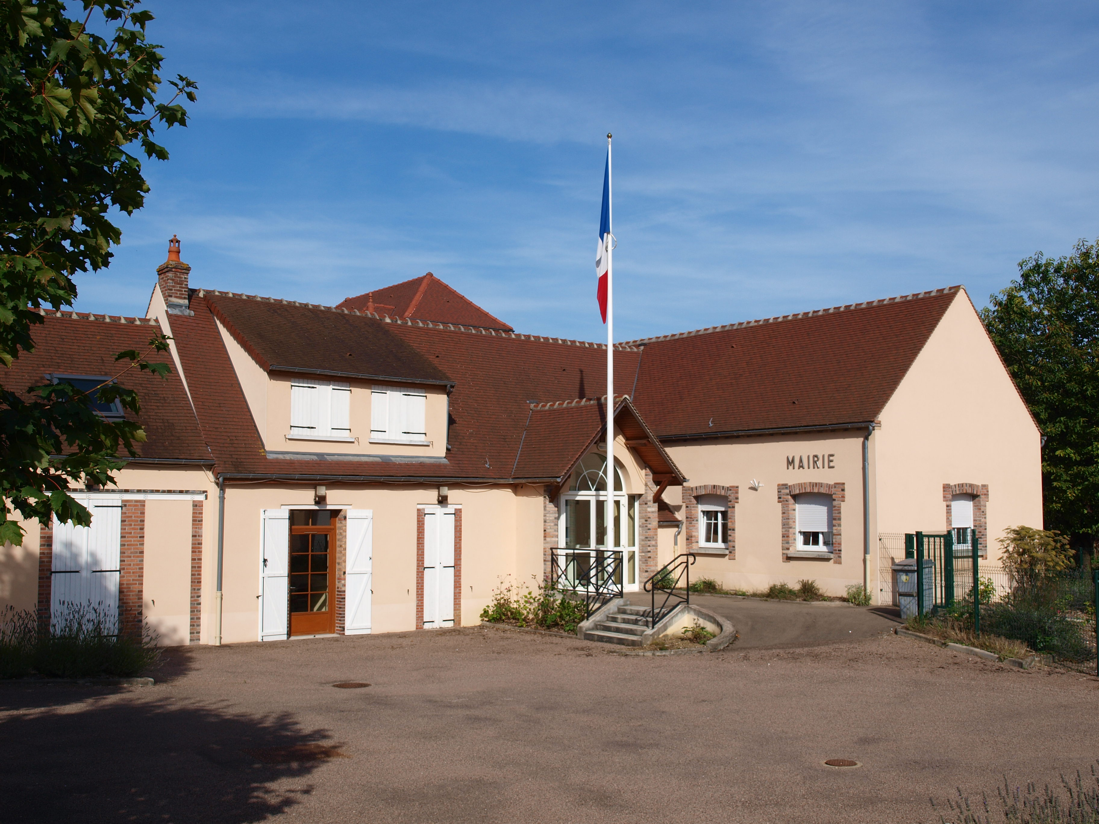 Courtois-sur-Yonne (Yonne, France) ; mairie, partie récente